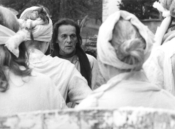 Francois Simon in der Rolle des Flohzirkusdirektors